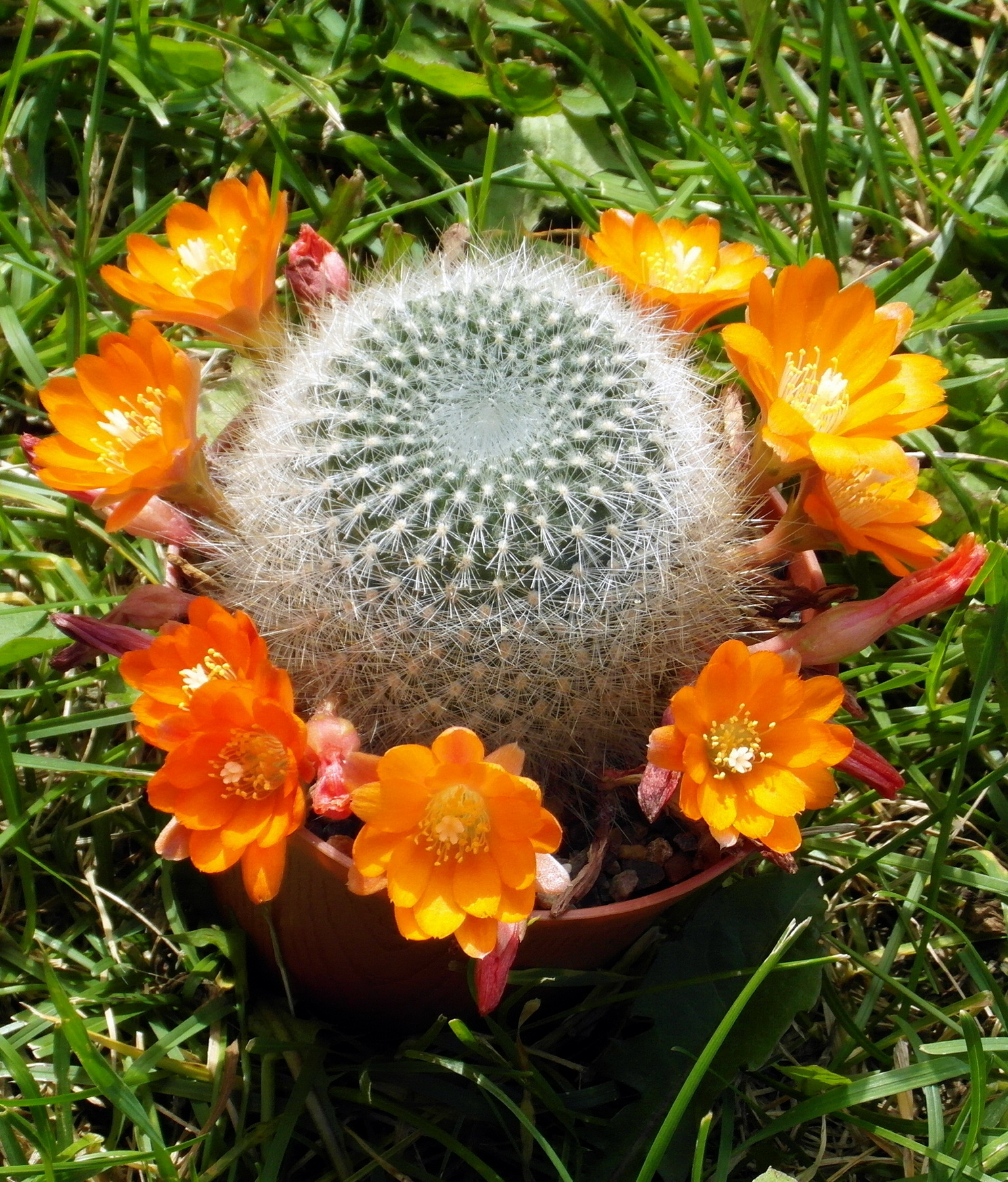 Rebutia fiebrigii